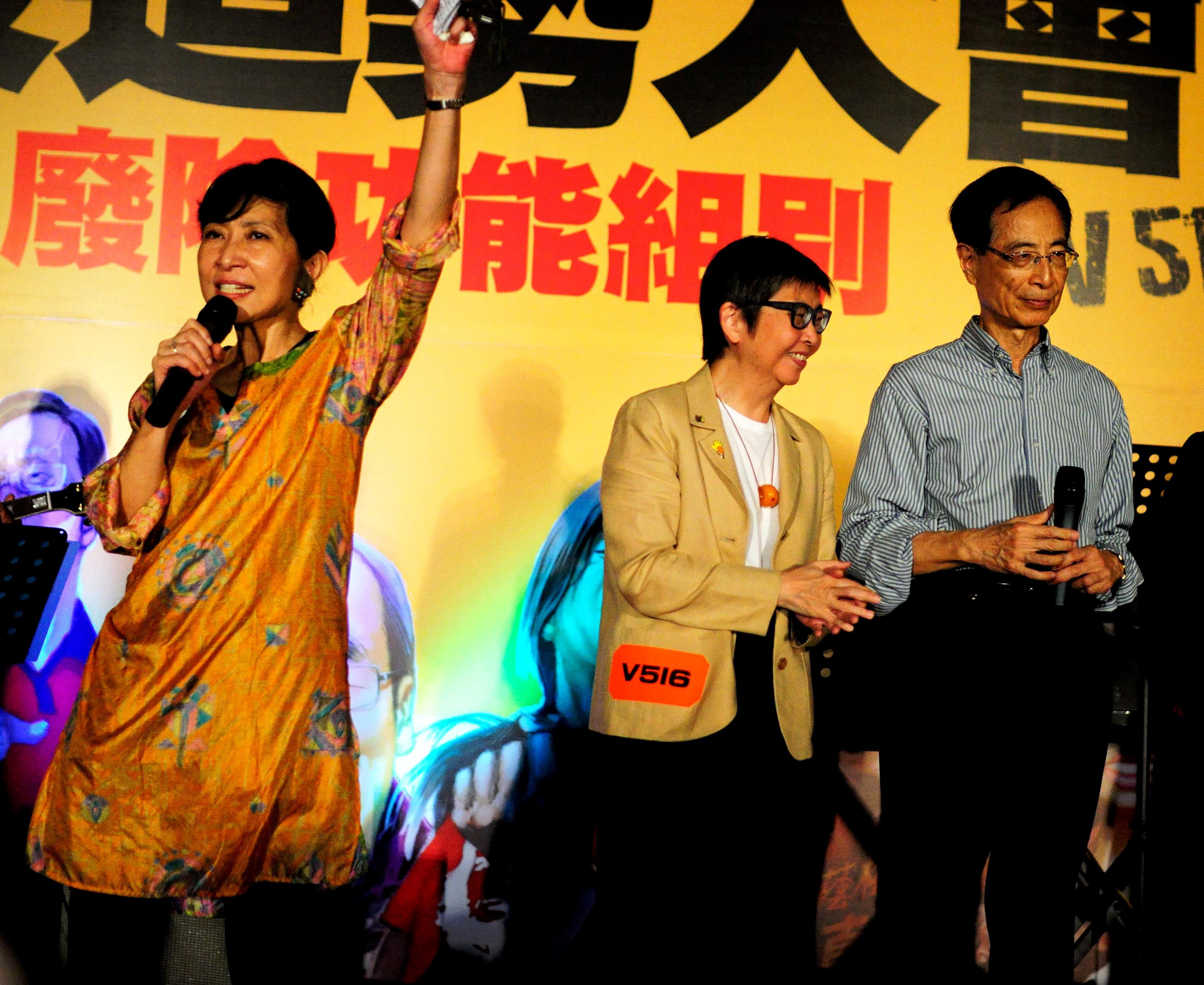 中文（香港）: 毛孟靜、吳靄儀和李柱銘等香港立法會議員在2010年五區公投爭取真普選大會